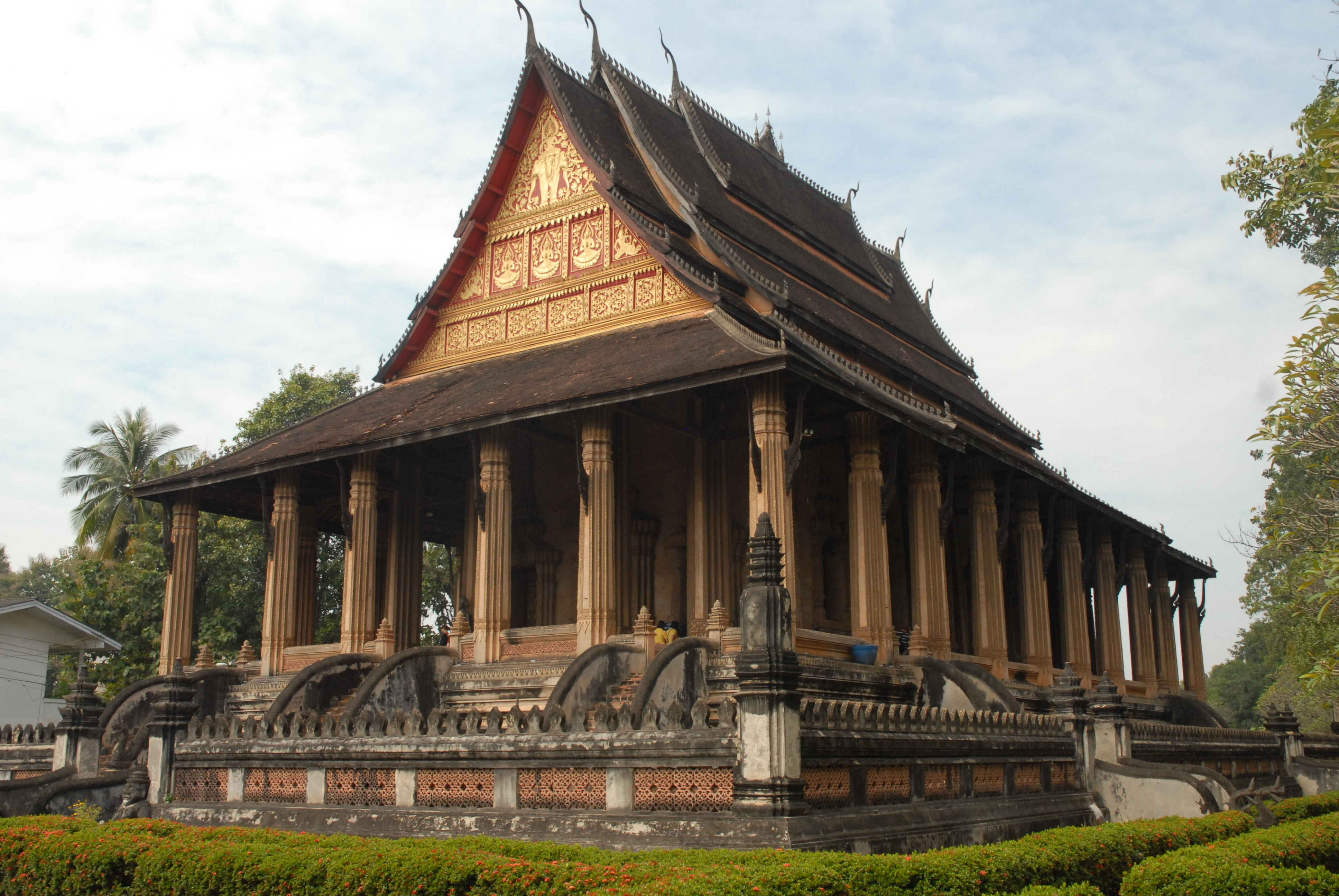 Pagode Vat Phra Kèo à Vientiane, appelée également "Temple du Bouddha d'émeraude"